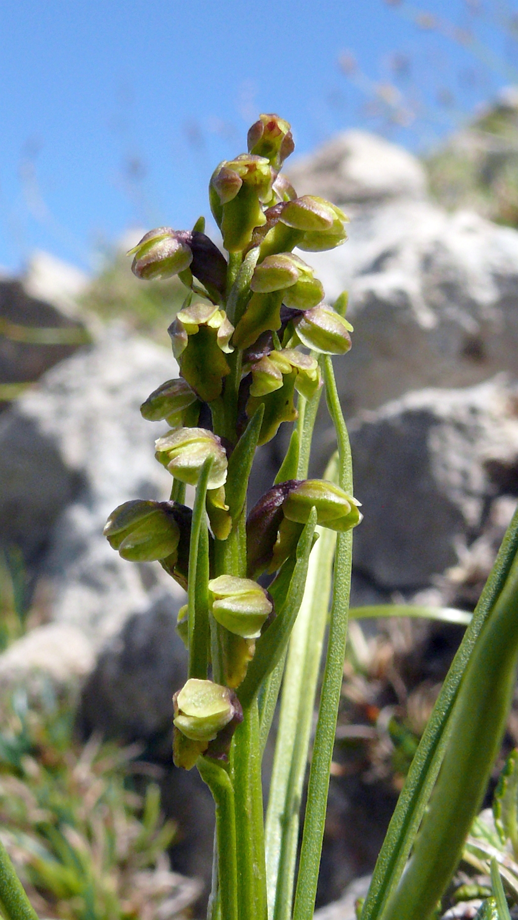 Chamorchis alpina, Allgäuer Alpen, Österreich